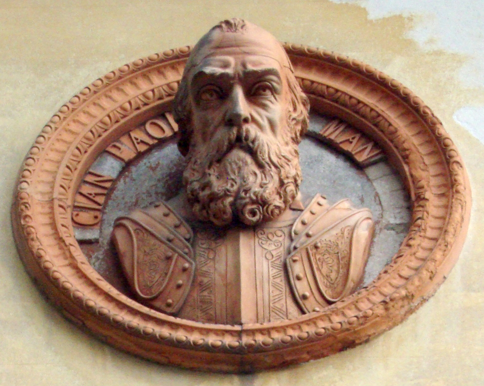 Schio, particolare della facciata del Teatro Jacquard This is a photo of a monument which is part of cultural heritage of Italy.